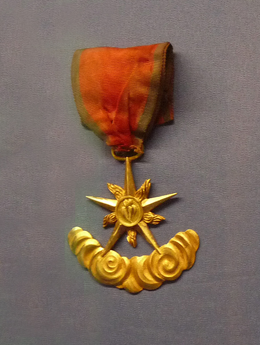 Franc-maçonnerie à Strasbourg : bijou de la loge des Coeurs Fidèles (1820-1841), en métal doré